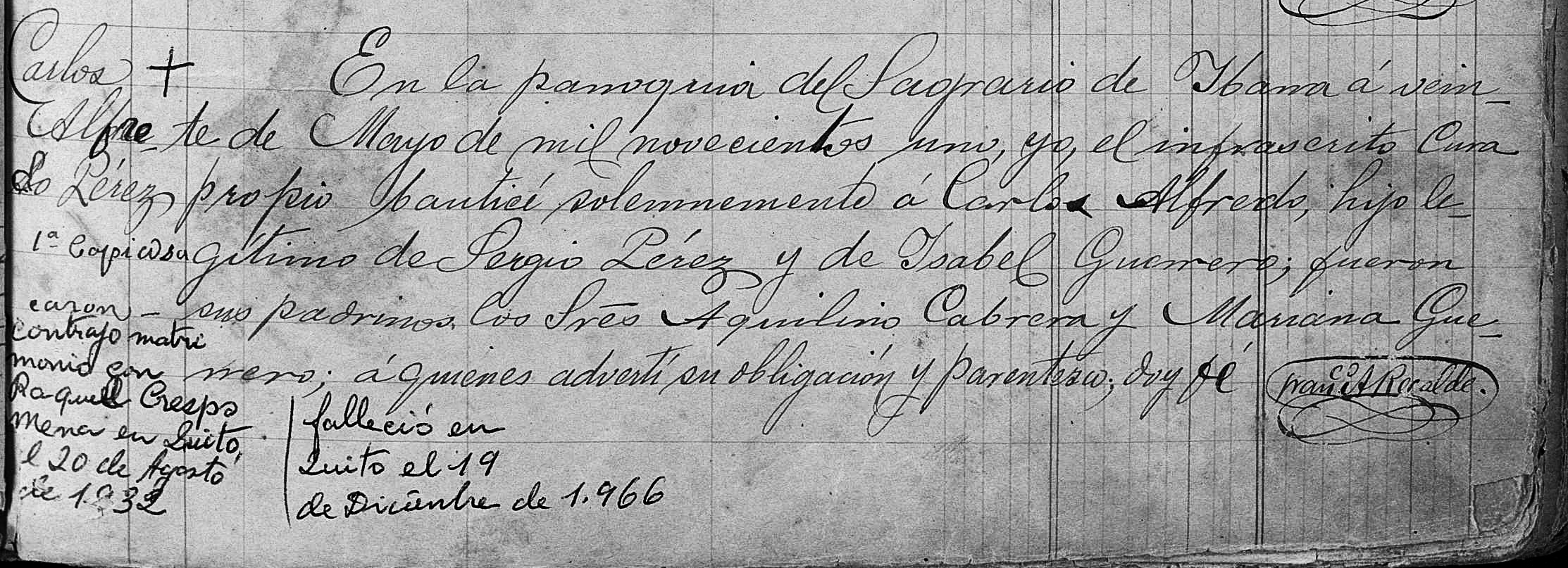 Bautismo